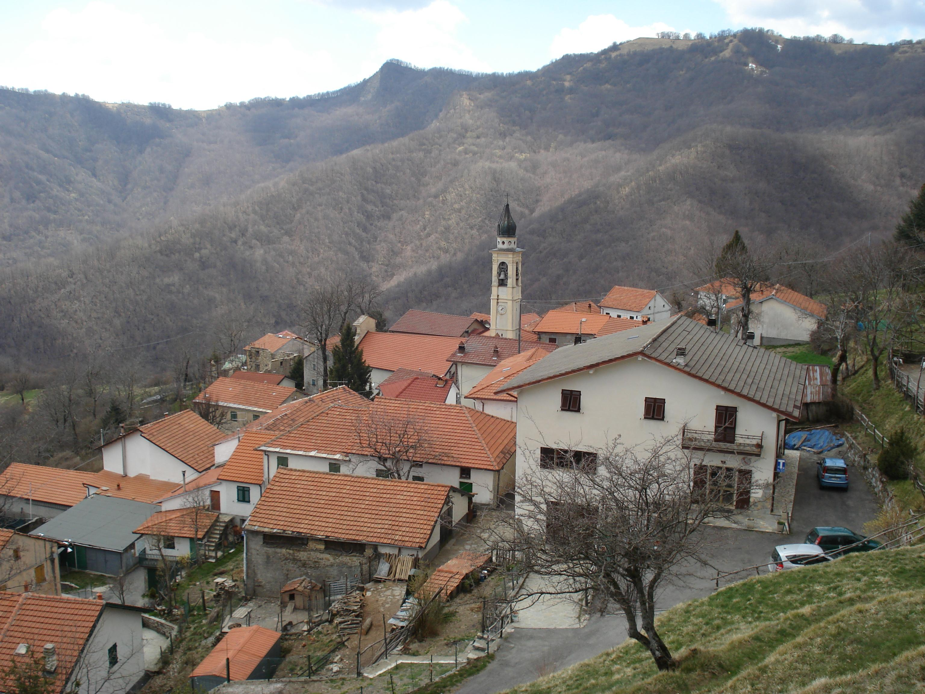 Cosmin latan,05-04-2008,Fascia